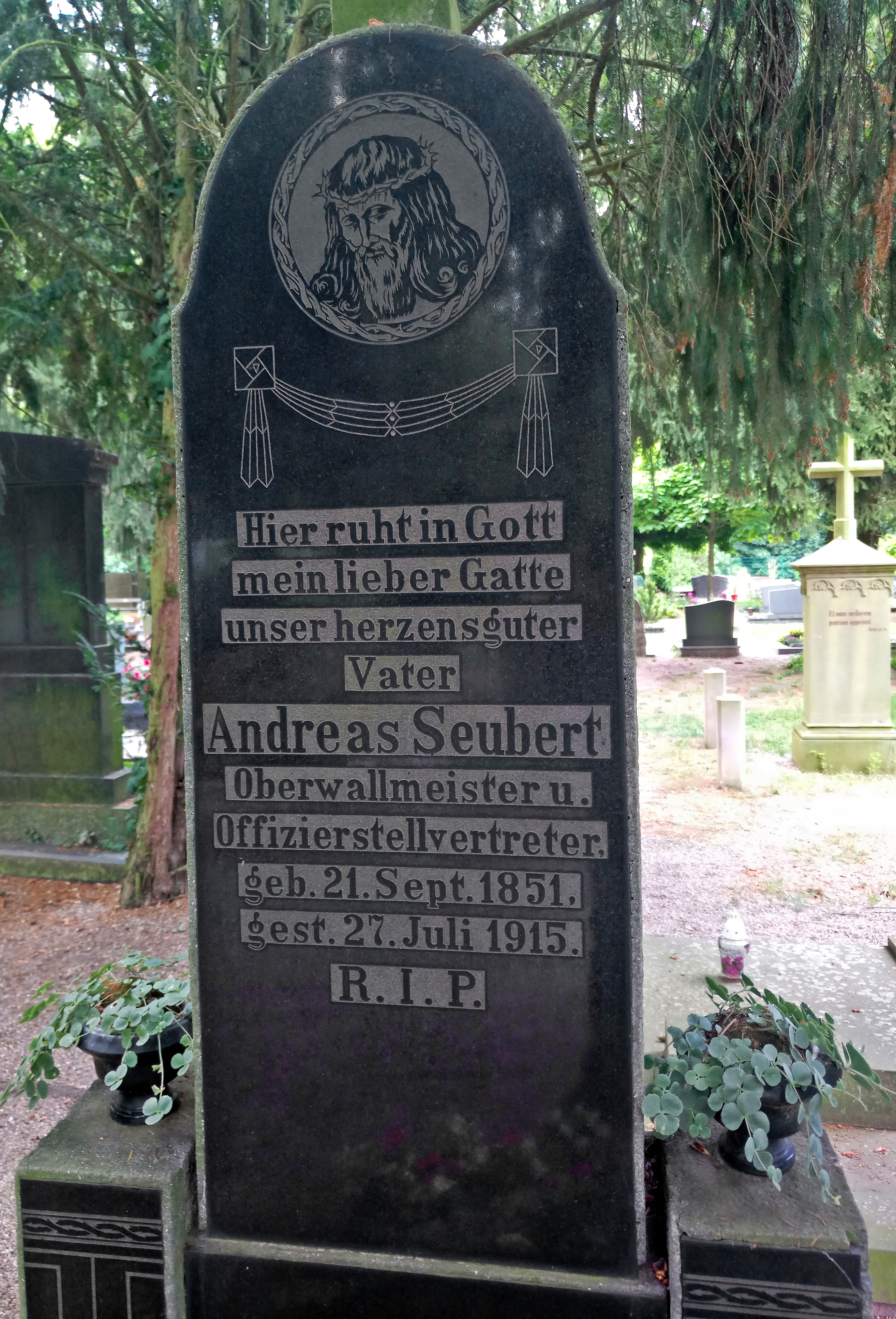 Friedhof Germersheim, Grab Oberwallmeister der Festung